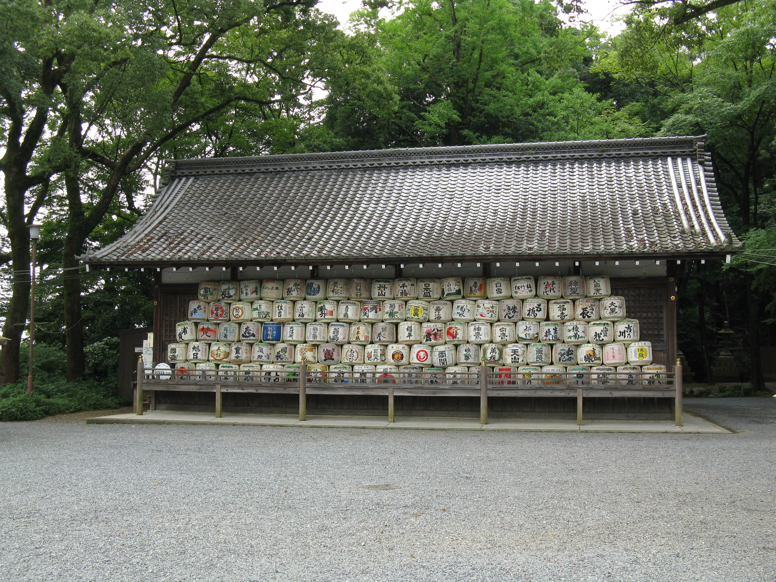 松尾大社 神輿蔵